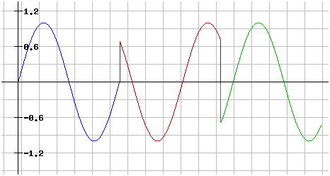 voorbeeld 8PSK